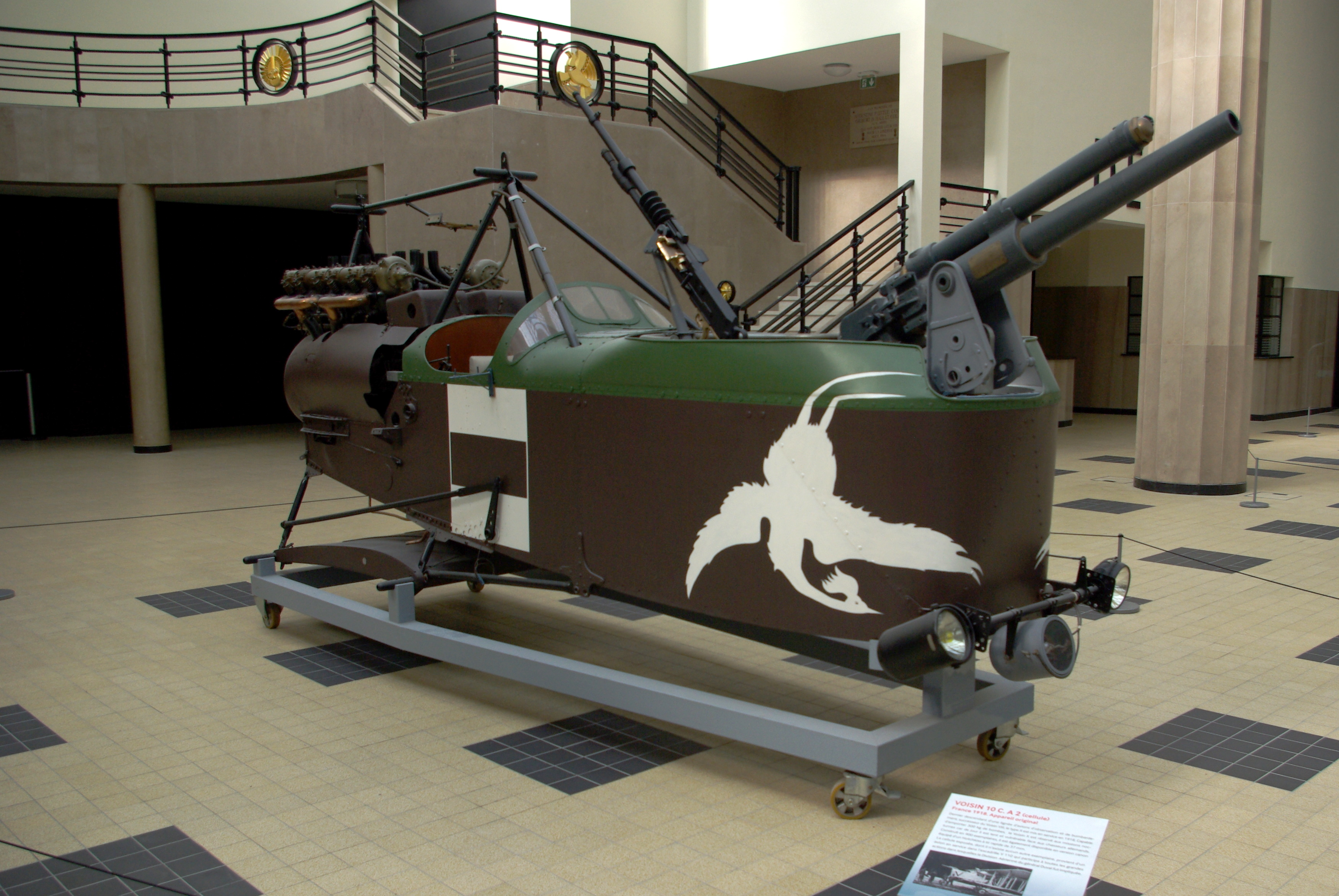 Cellule d'un Voisin 10 CA2 exposé dans la salle des neuf colonnes au Musée de l'air et de l'espace.